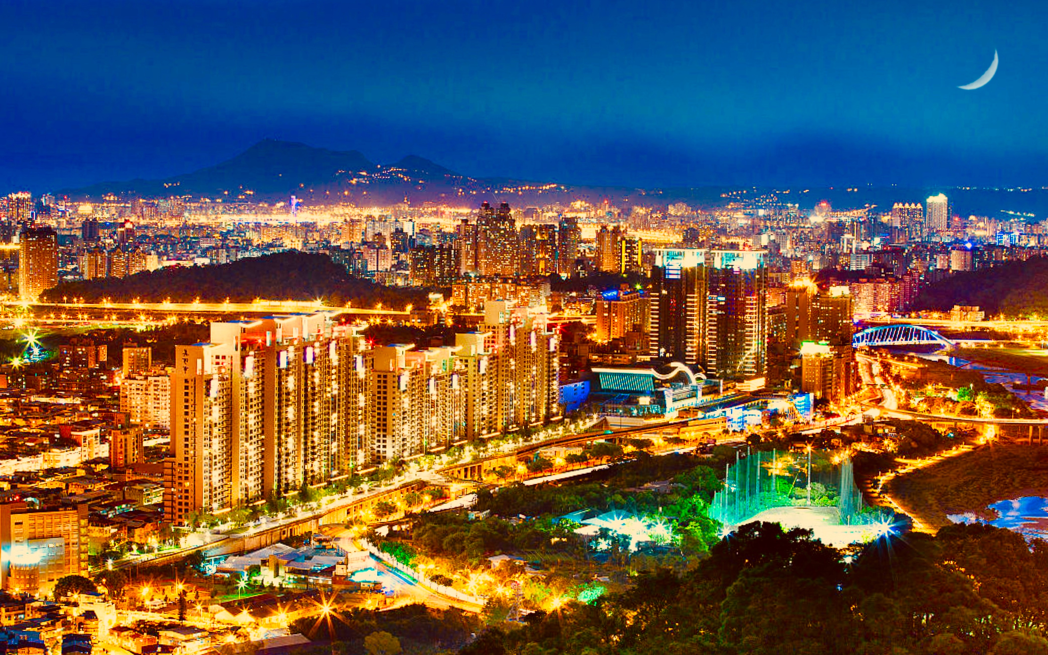 新北市天際線夜景